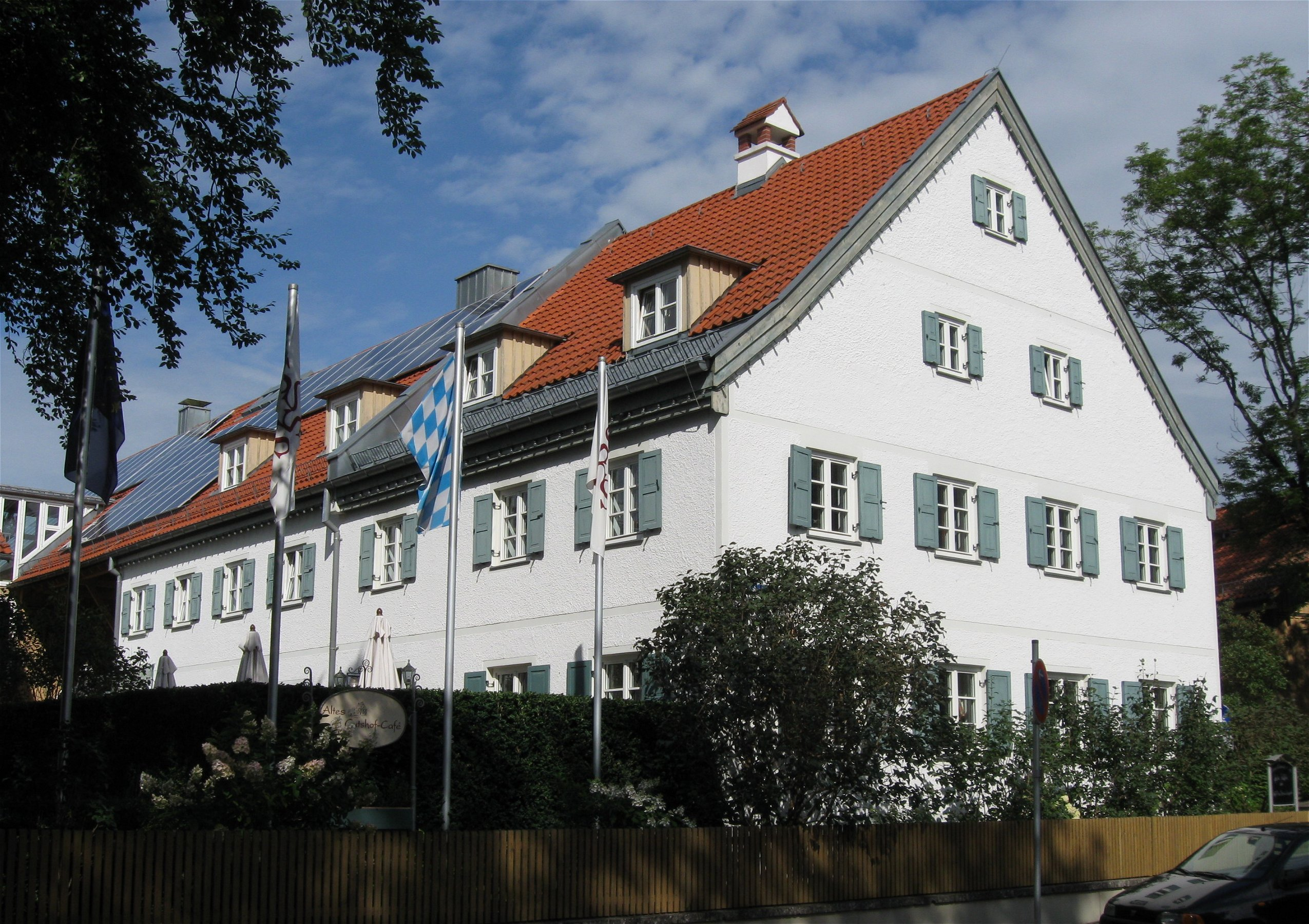 Habenschadenstraße 4; Ehem. Bauernhaus (Seitnerhof), Giebelbau mit Putzbandgliederungen, Mitte 19. Jh., Pullach im Isartal